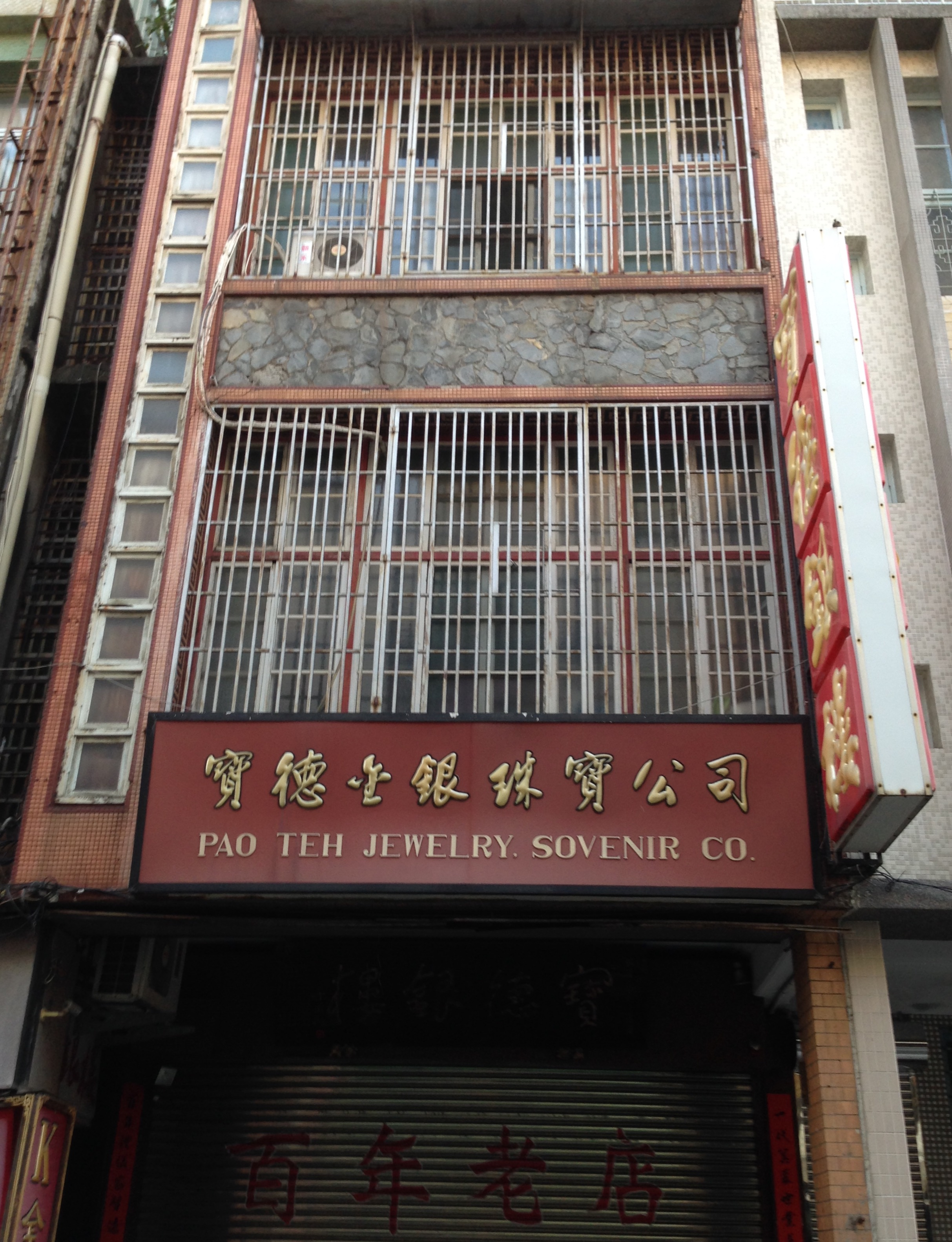 中文（台灣）: 屏東市寶德銀樓